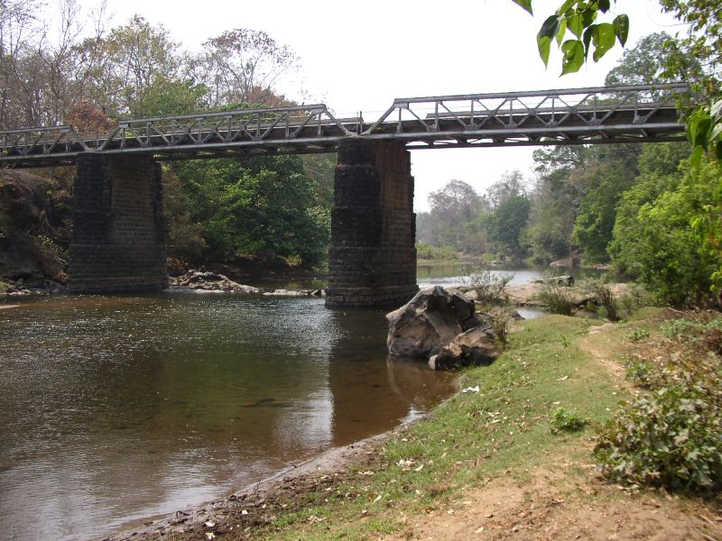 Nedungayam Bridge Nilambur